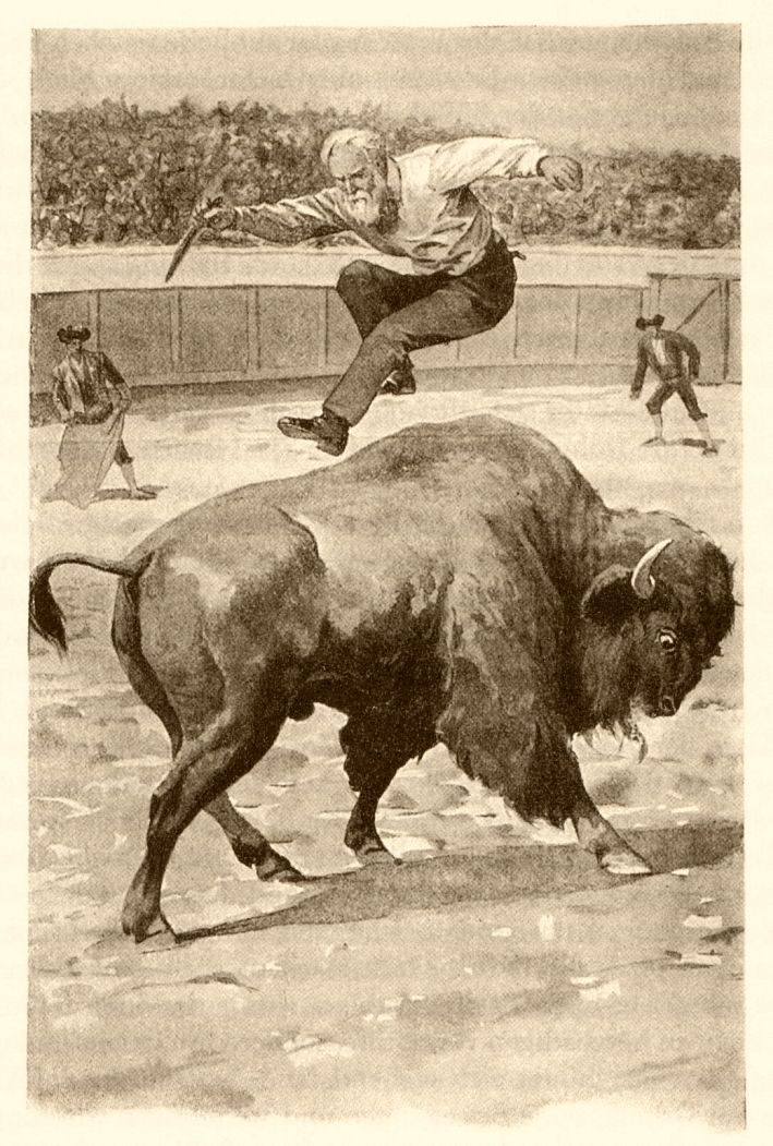 Ilustrace Věnceslava Černého k románu Karla Maye Odkaz Inky z roku 1908